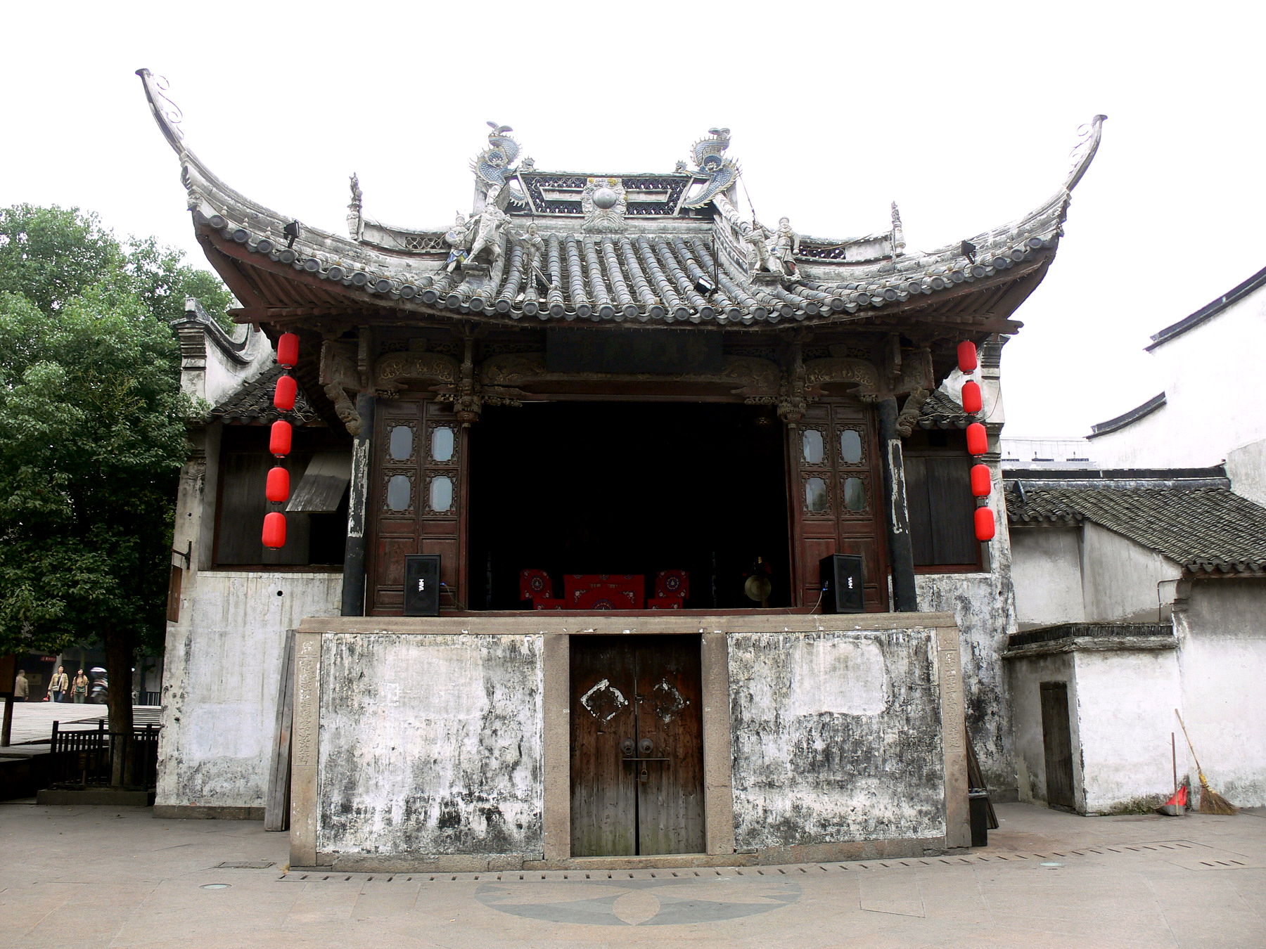 浙江桐乡乌镇修真观